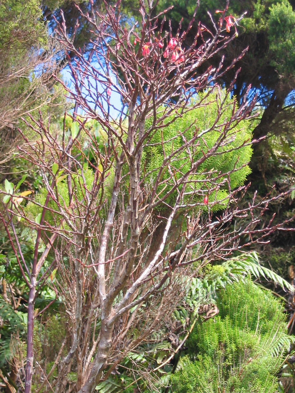 Walzenförmiger Heidelbeerbaum (Vaccinium cylindraceum) - Habitus